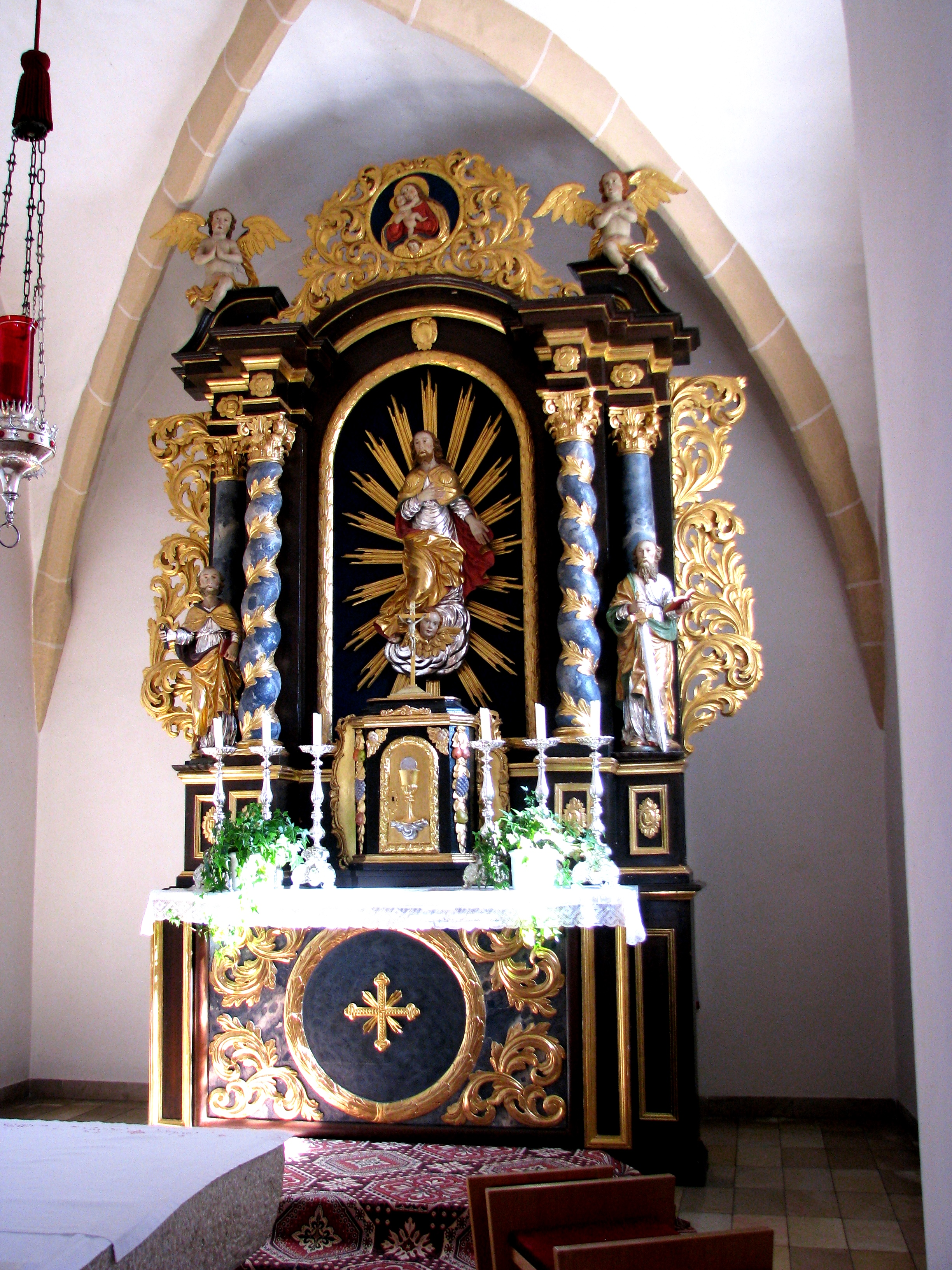 Oberbuchfeld, Ortsteil von Deining im Landkreis Neumarkt in der Oberpfalz, Bayern, Hauptaltar von St. Jakobus d. Ä.